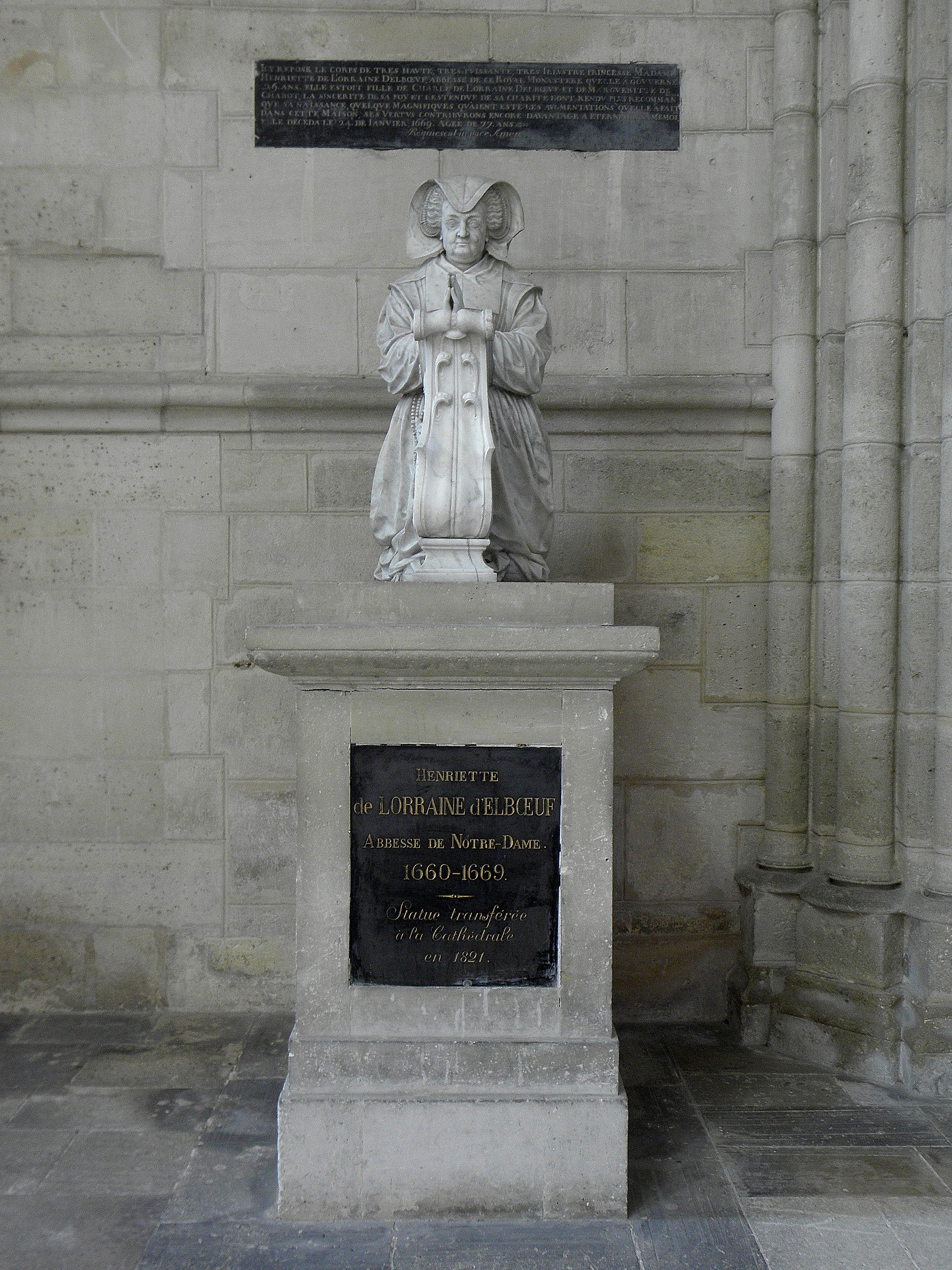 Priant de Marie Crèvecœur en la cathédrale Saint-Gervais et Saint-Protais de Soissons (02).